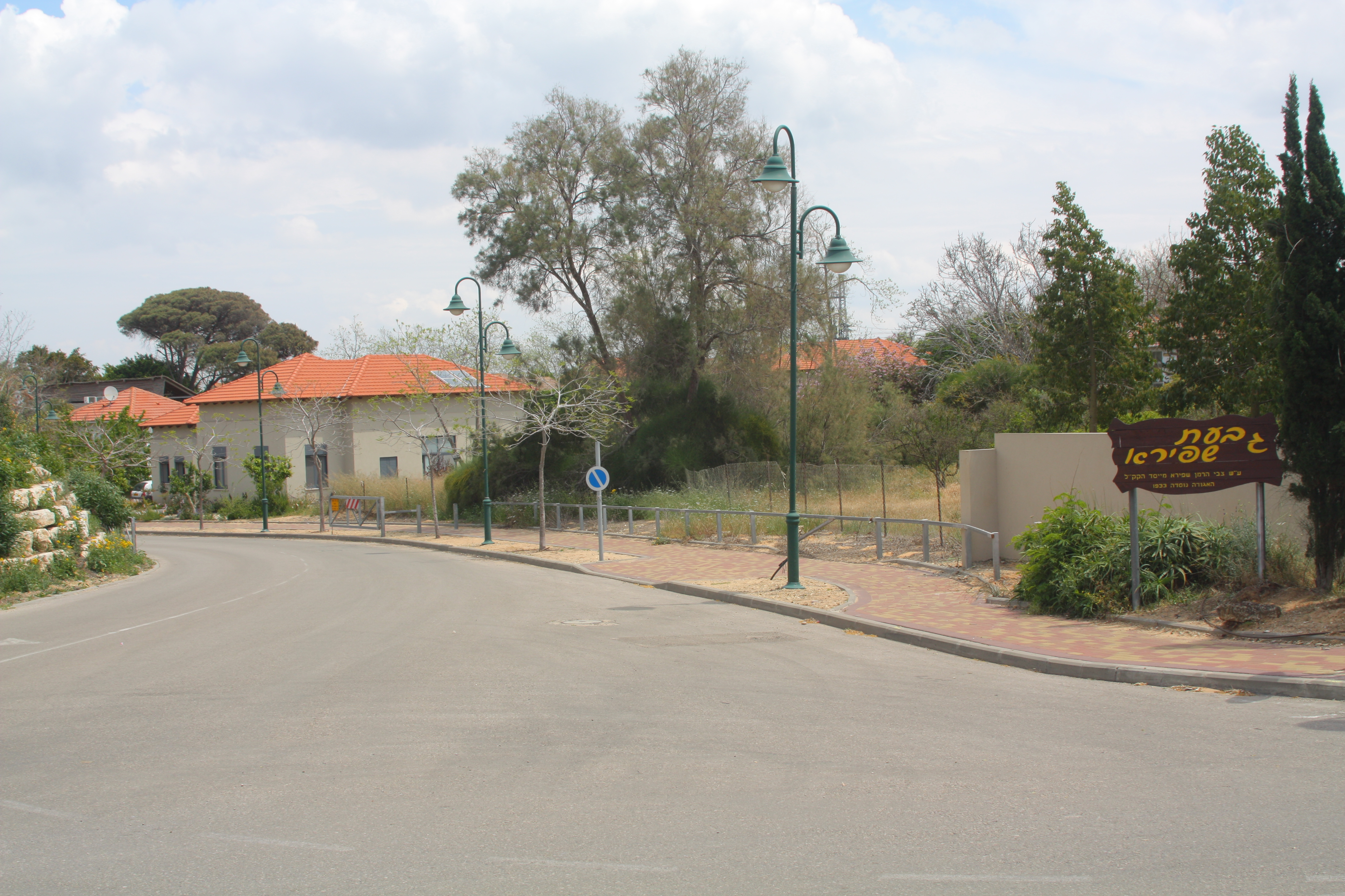 הכניסה לגבעת שפירא Entrance to Givat Shapira